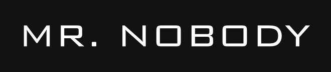 Logo du film Mr. Nobody